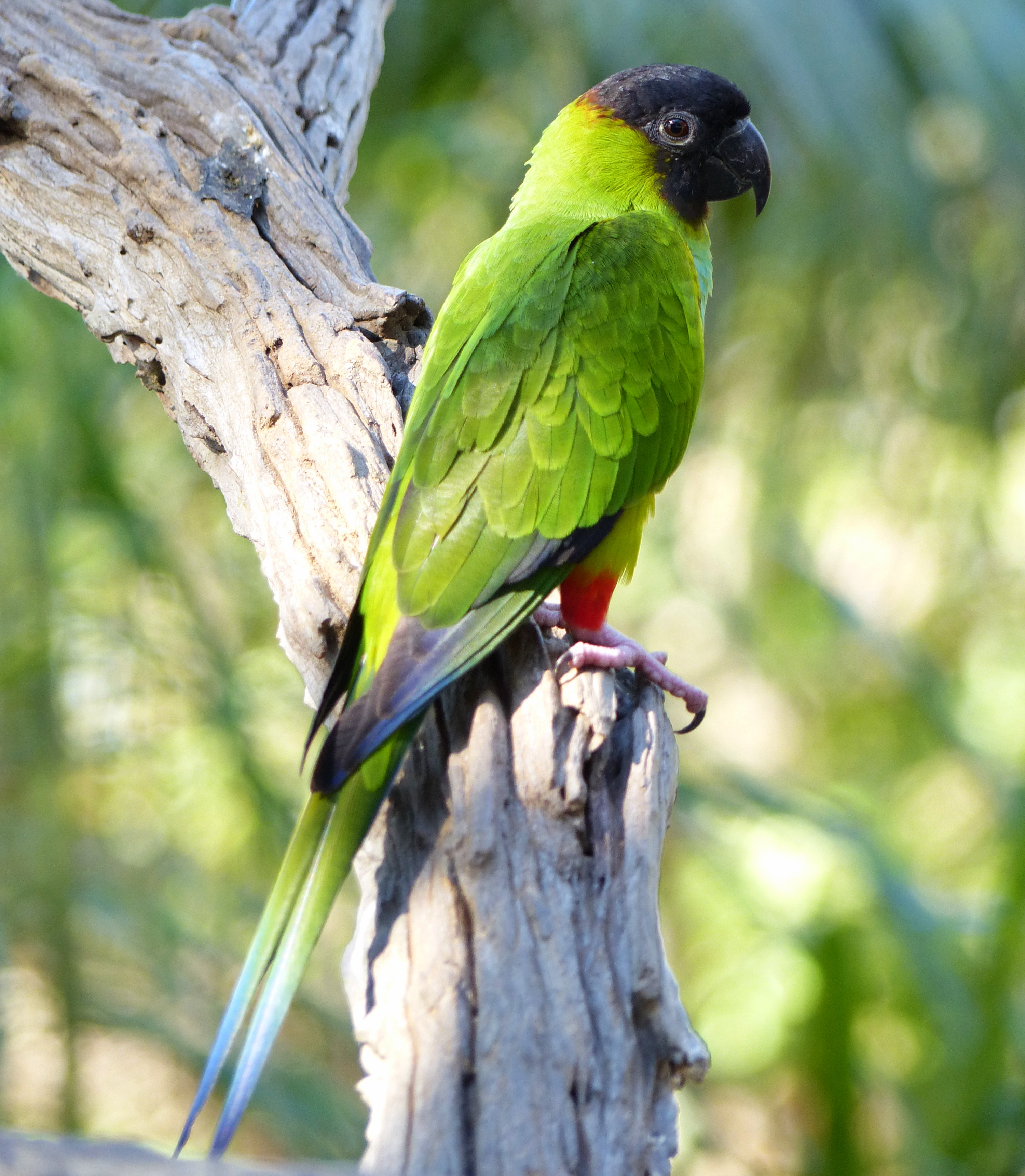 Pousada Rio Claro, Transpantaneira, Poconé, Mato Grosso, BRAZIL